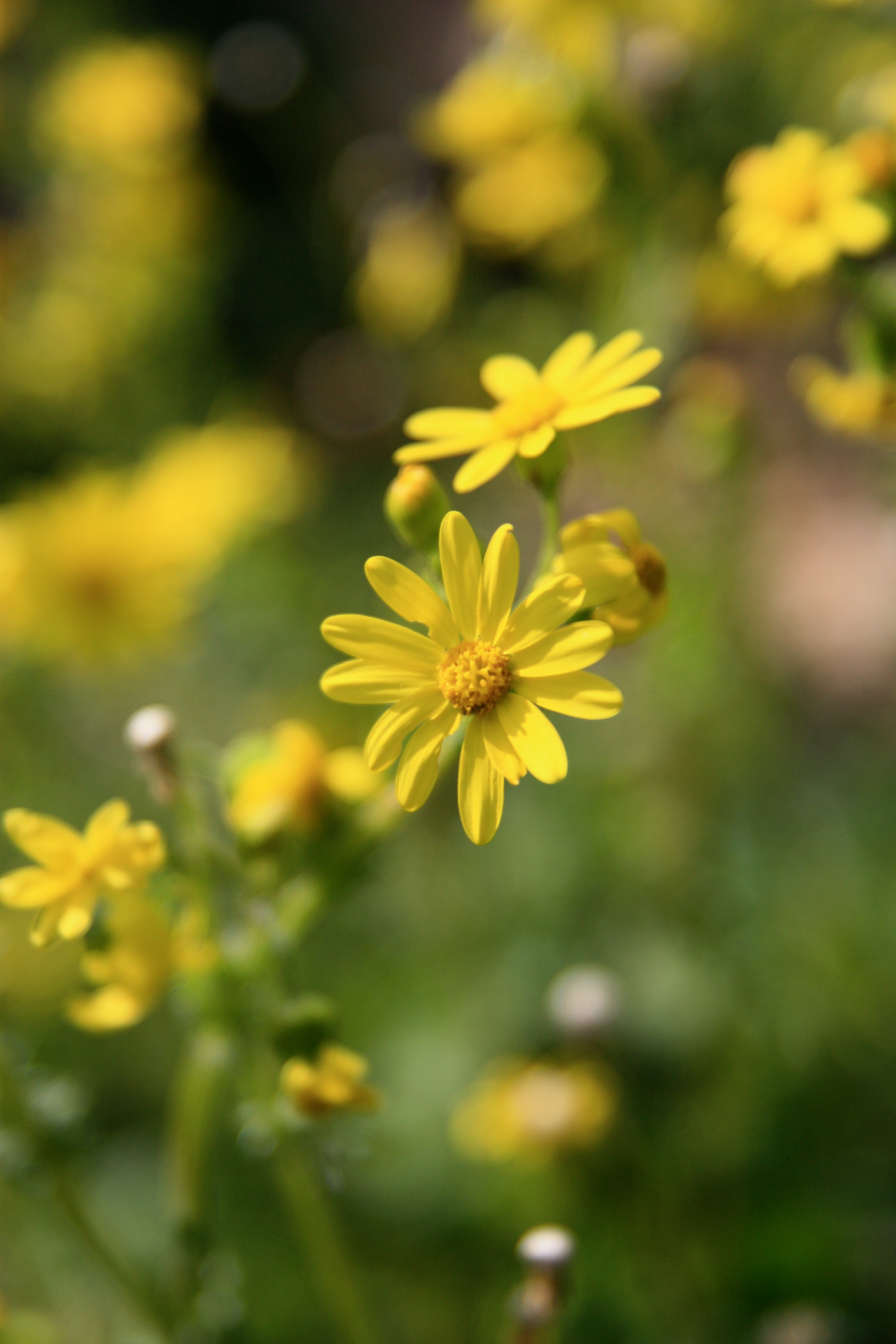 חורשת המייסדים - גבעת השבשבת, נוה שאנן חיפה enI Founders Grove - Pinwheel Hill Haifa